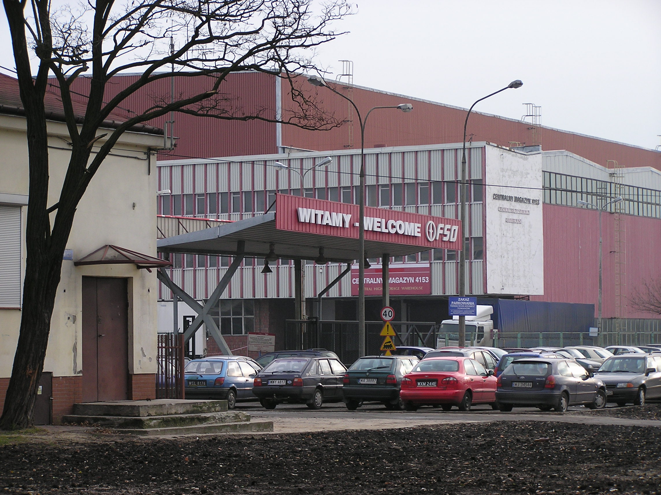 FSO Warszawa, brama główna